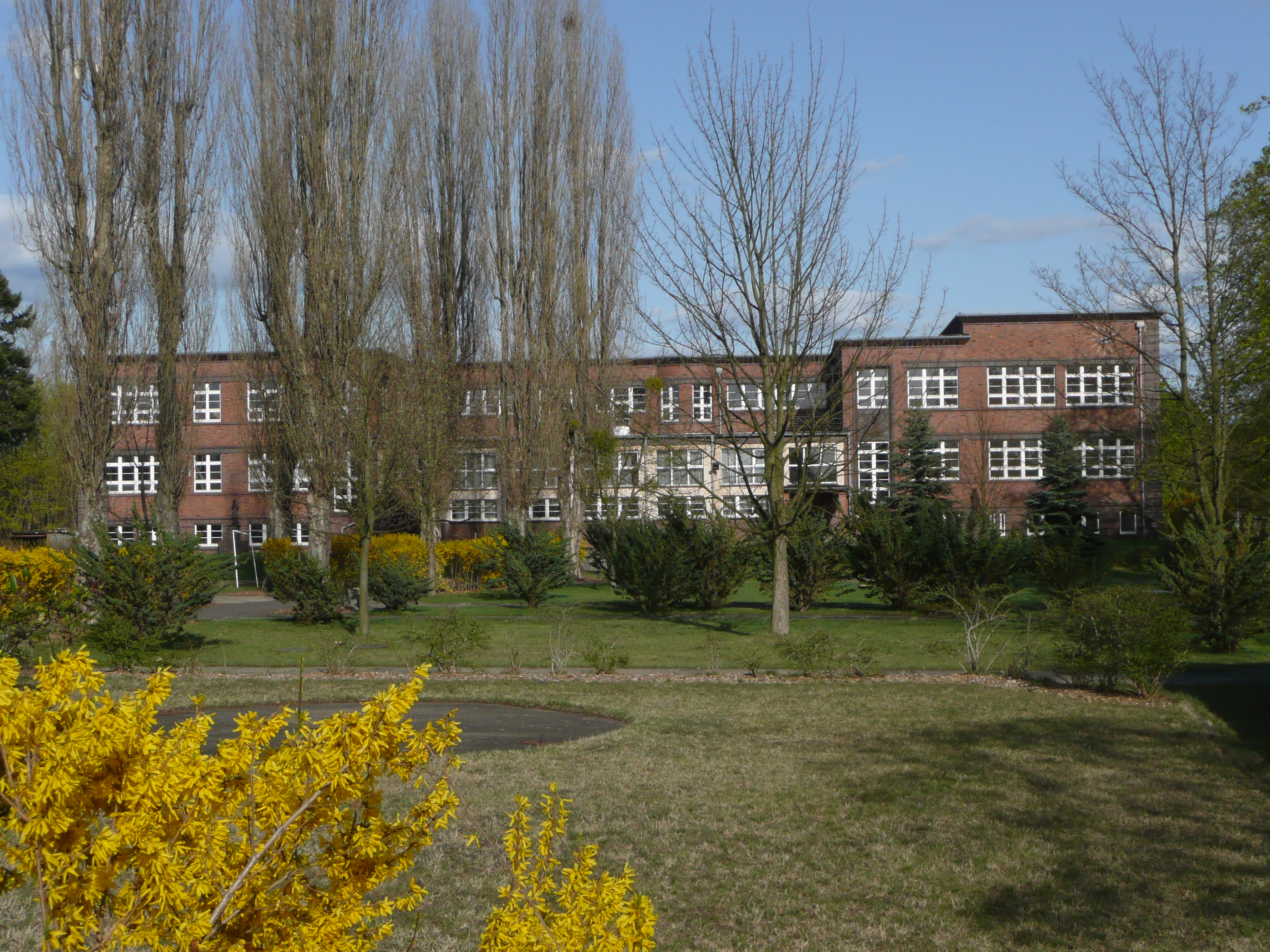 Ehemalige Puschkin (Realschule) Schule in Welzow